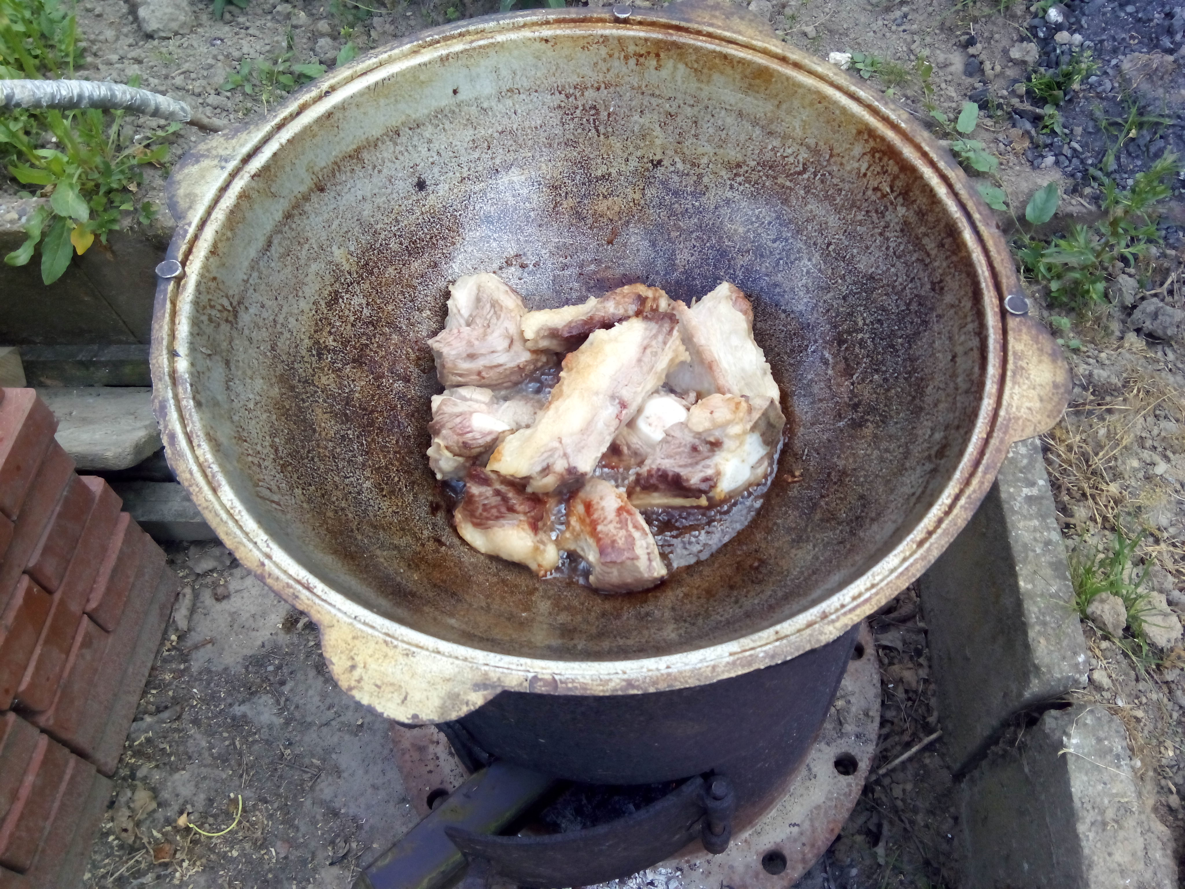 Мясо для плова готовится в казане